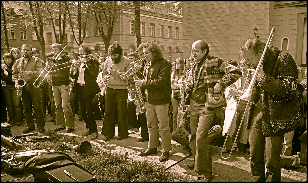 Open Air Konzert in Wuppertal (Laurentiusplatz) in den 1970-er Jahren